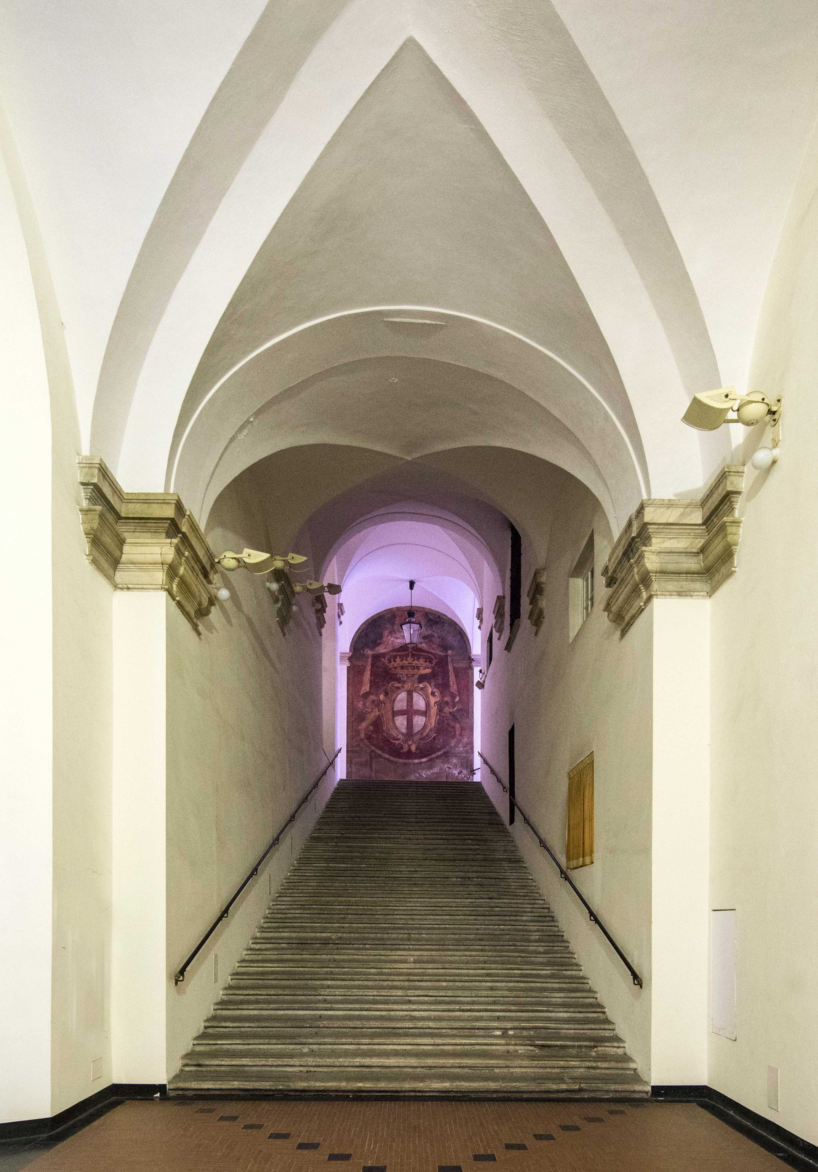 Scalone interno di Palazzo Ducale a Genova